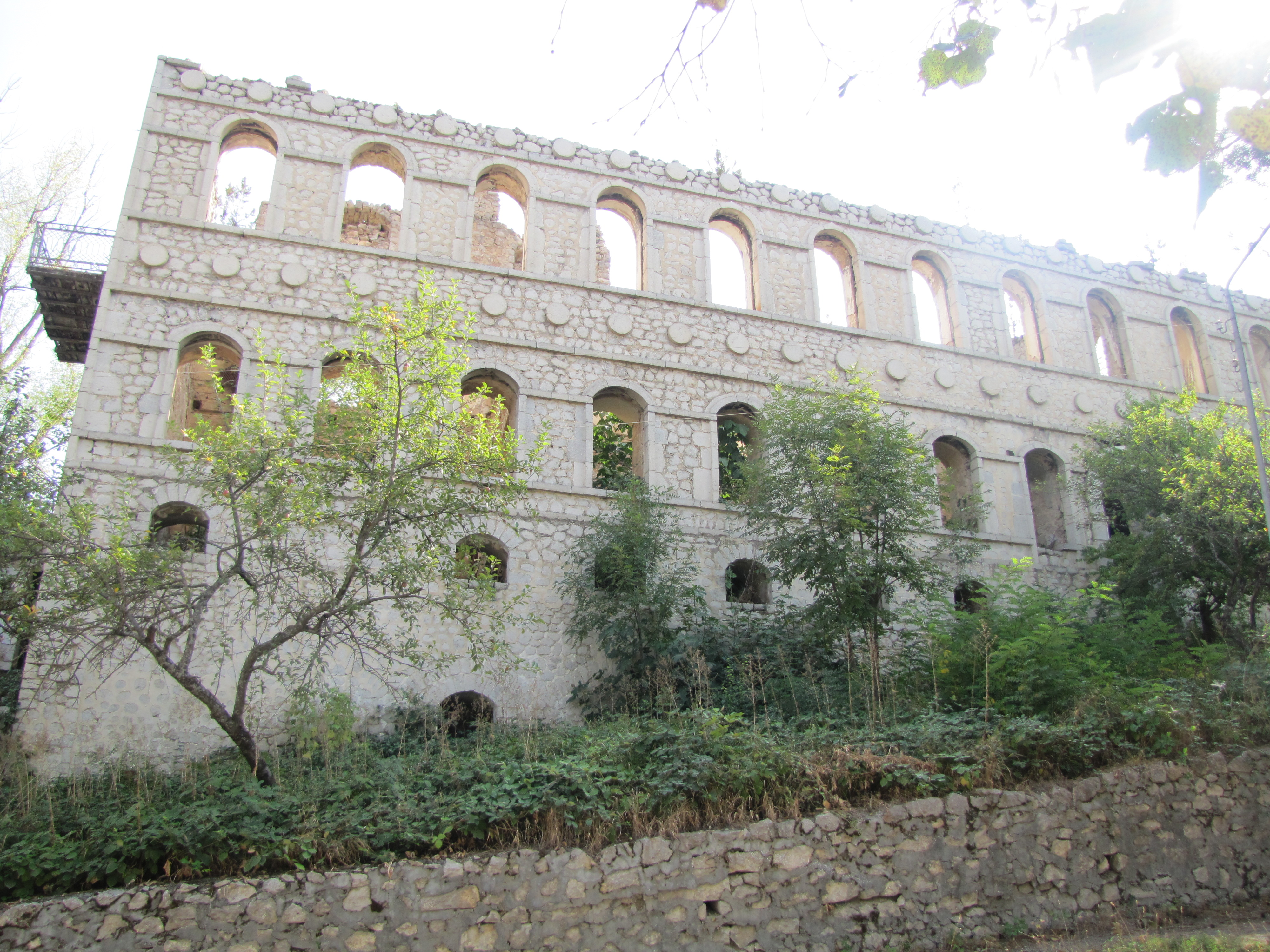 Շուշիի հին ավերակներից